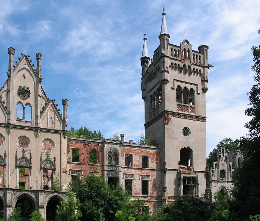 Ruiny pałacu w Kopicach